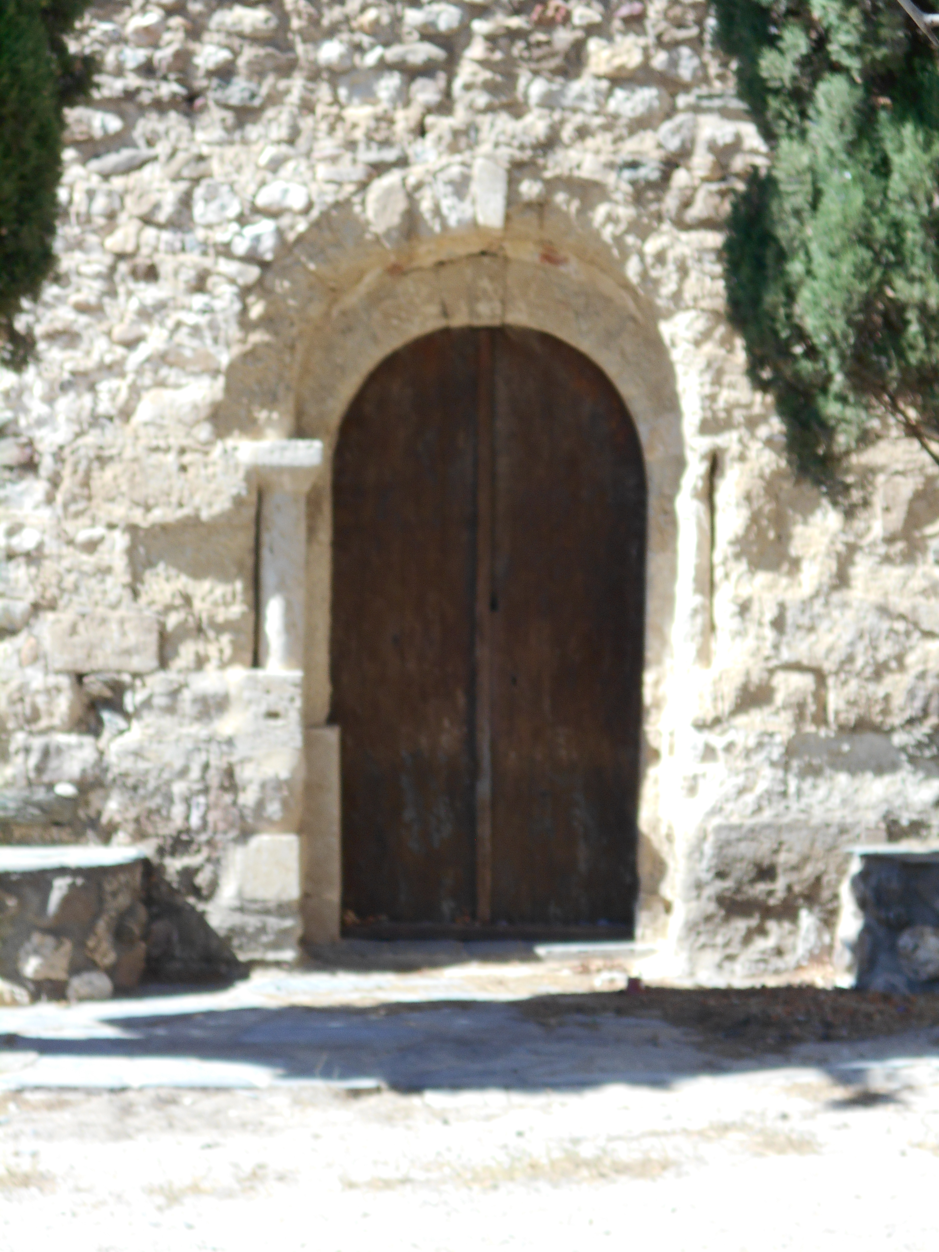 Porta de l'església, a la façana de migdia